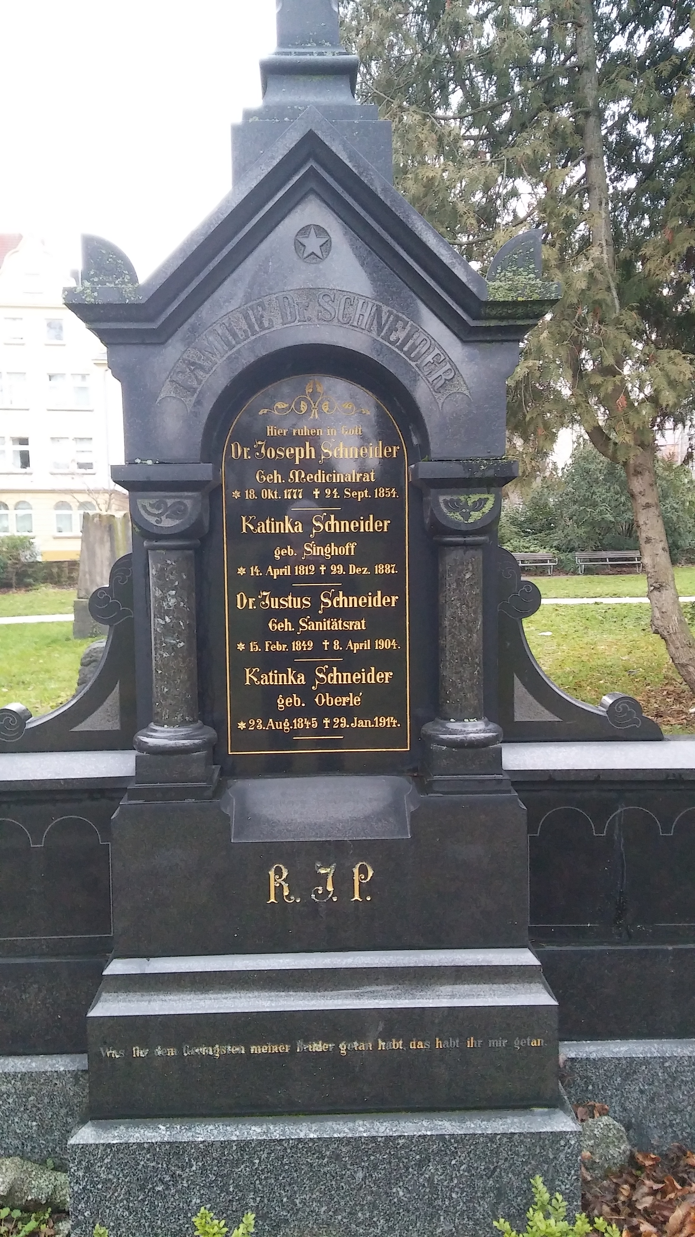 Grabstein von Johann Joseph Schneider, Justus Schneider und ihrer Ehefrauen